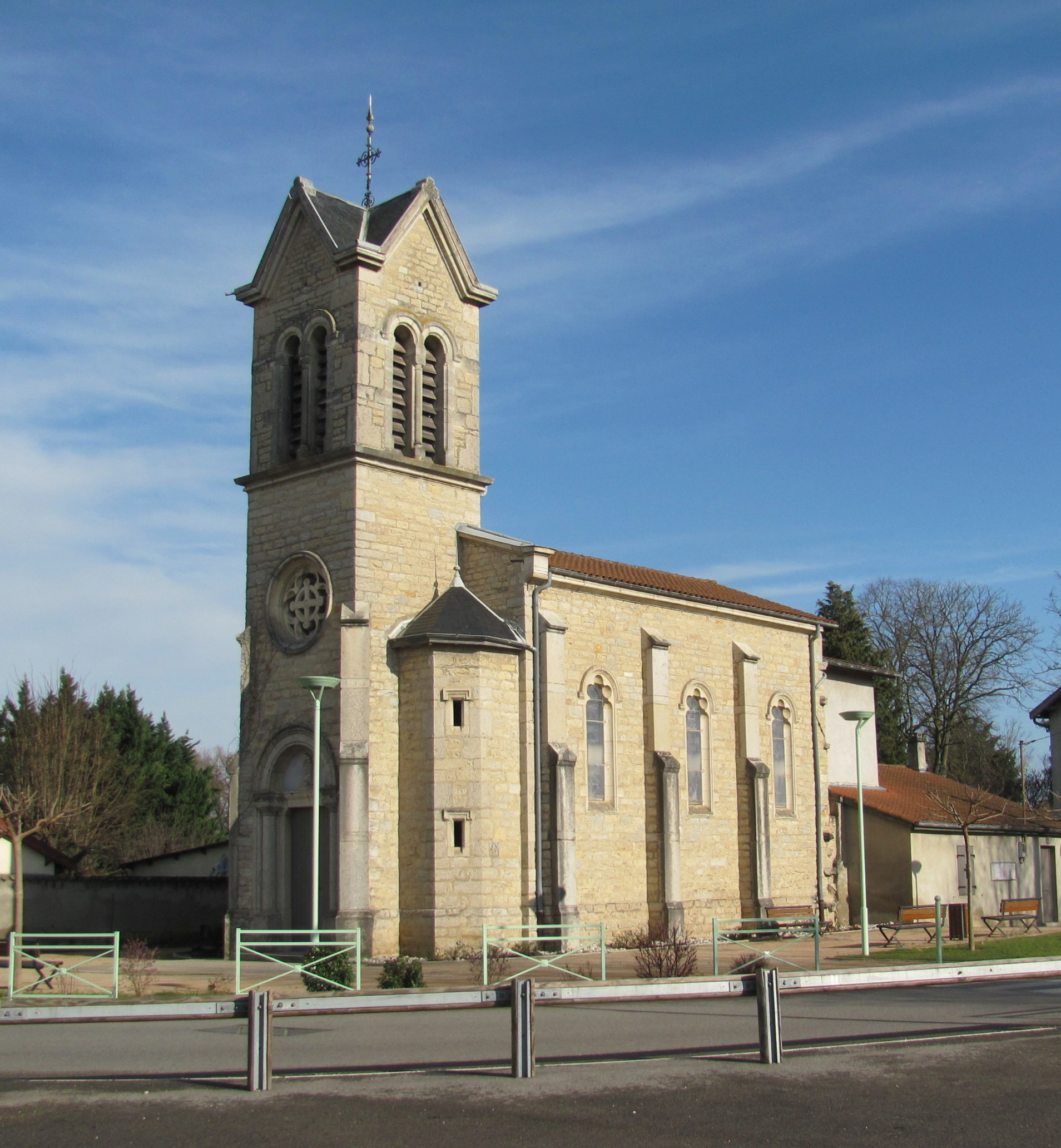 L'église de Thil (Ain).